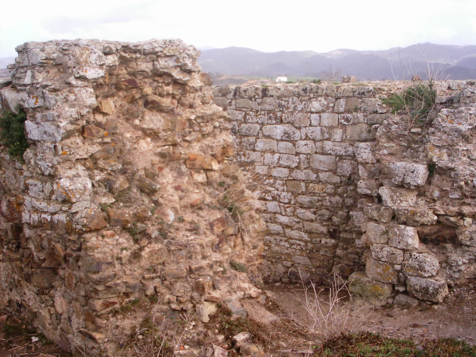 Castelo de Aljezur, Aljezur, Portugal.